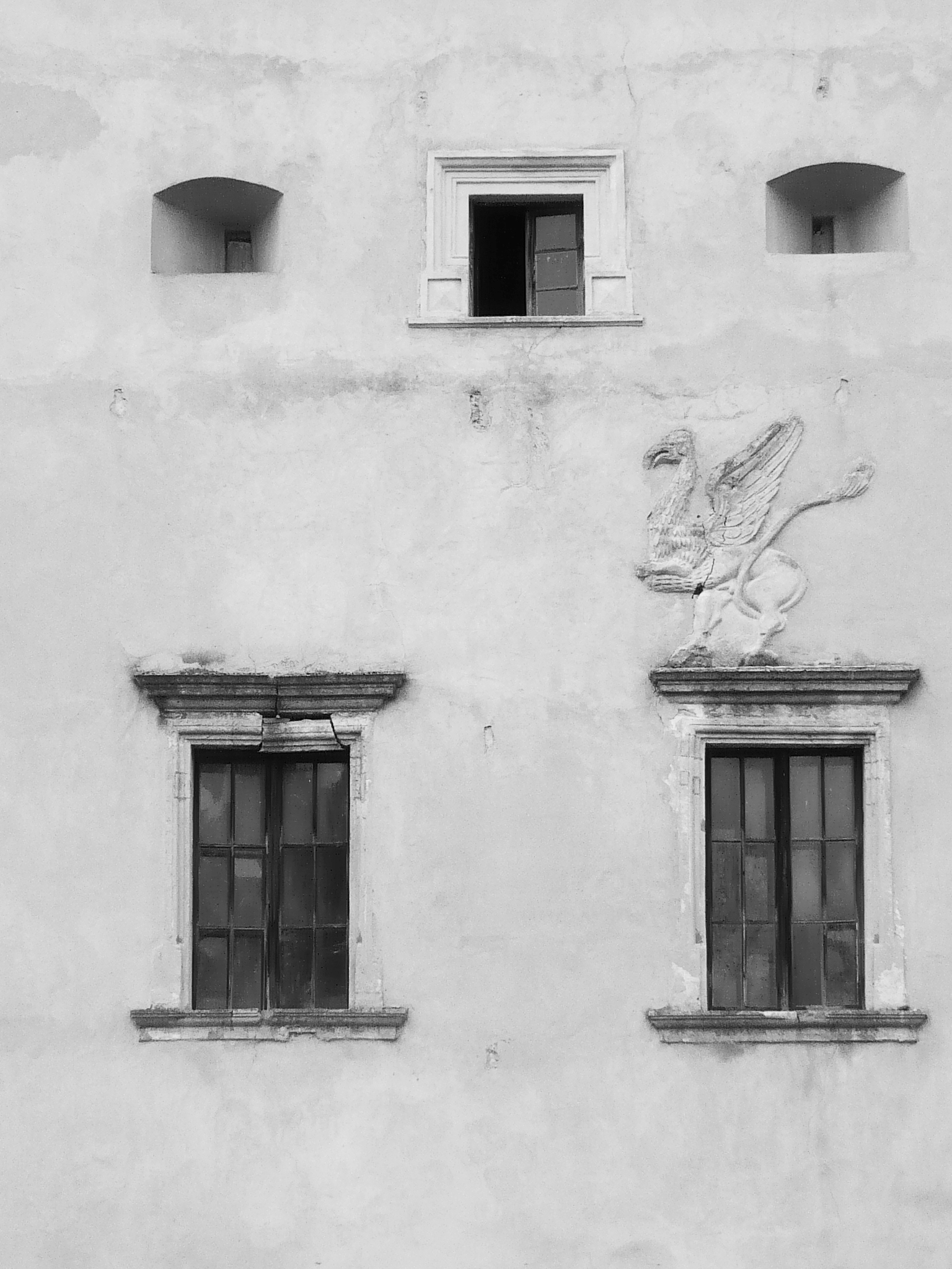 Fragment elewacji zamku w Świrzu na Ukrainie. Zamek stanowił pierwotnie własność książąt Świrskich, od XVII wieku należał do rodu Cetnerów, zniszczony podczas wojen kozackich w 1648, zdobyty przez Turków w 1672. Po pierwszym rozbiorze Rzeczypospolitej znalazł się na obszarze zaboru austriackiego. Ostatnimi właścicielami przed 1939 byli Irena z Lamezanów i jej mąż Tadeusz Komorowski, późniejszy dowódca Armii Krajowej i powstania warszawskiego